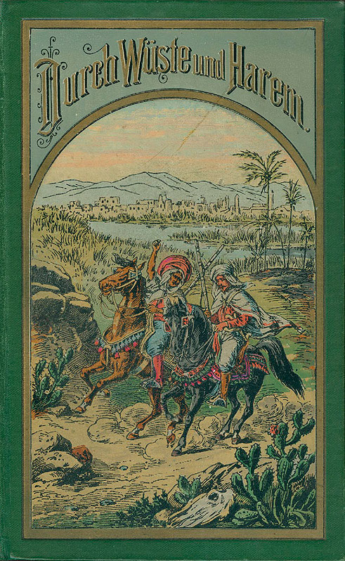 Titel einer der ersten drei Auflagen von Karl Mays Durch Wüste und Harem, das ab der vierten Auflage (1895) in Durch die Wüste umbenannt wurde.